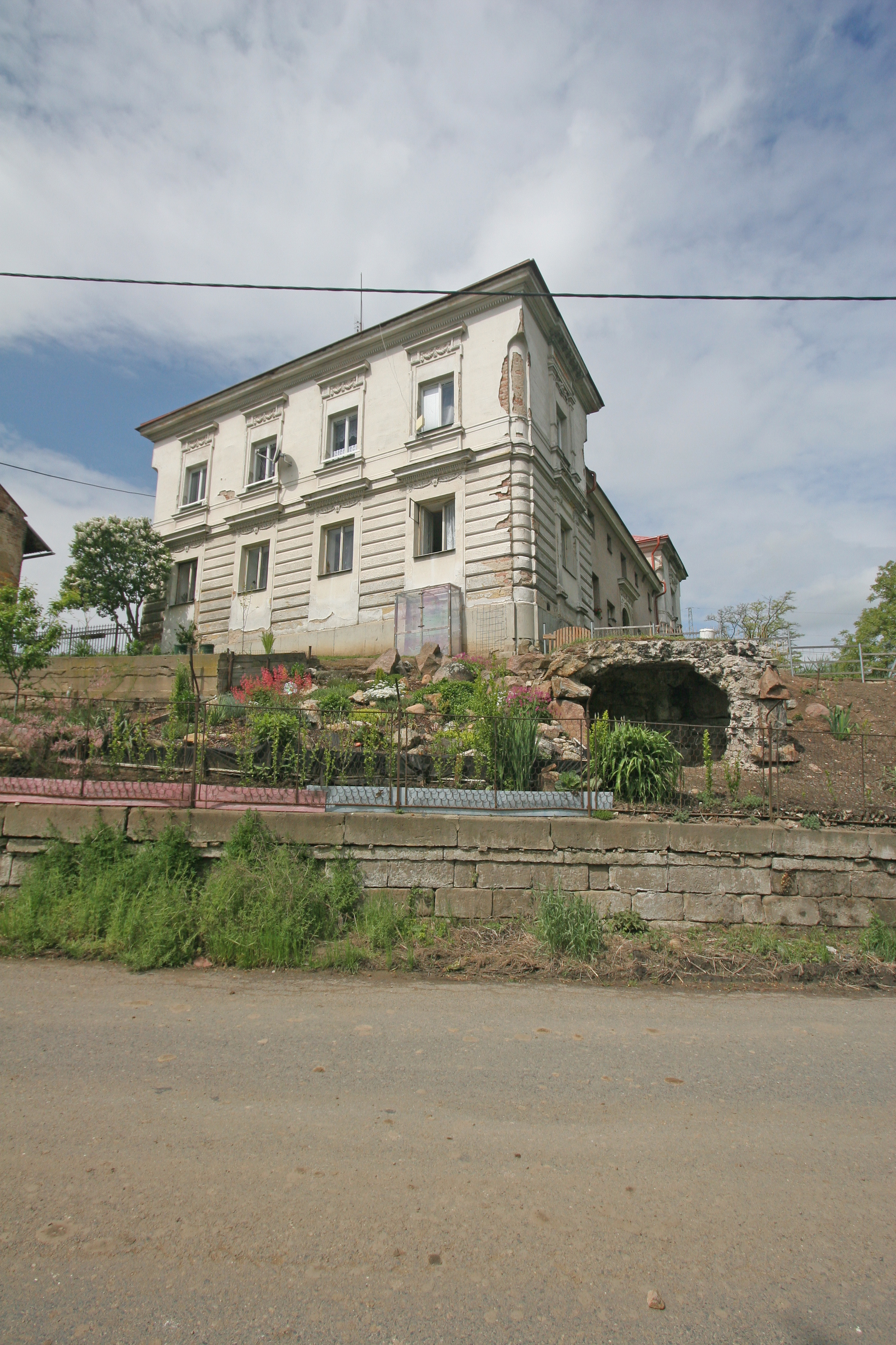 Vestec čp. 5